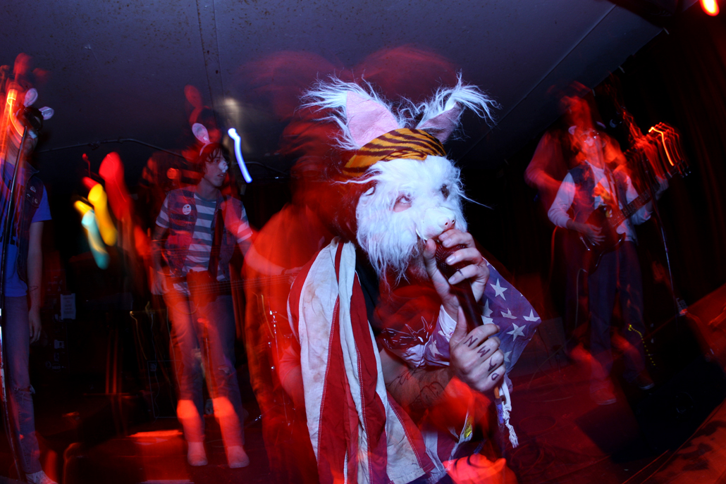 Nobunny